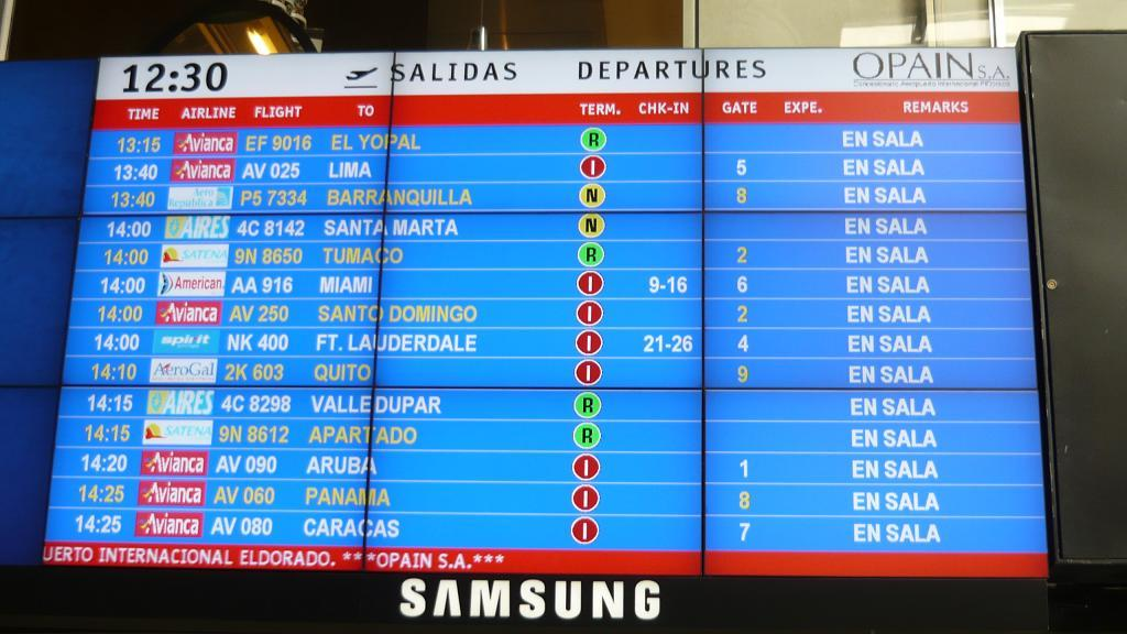 Pantalla de vuelos aeropuerto El Dorado